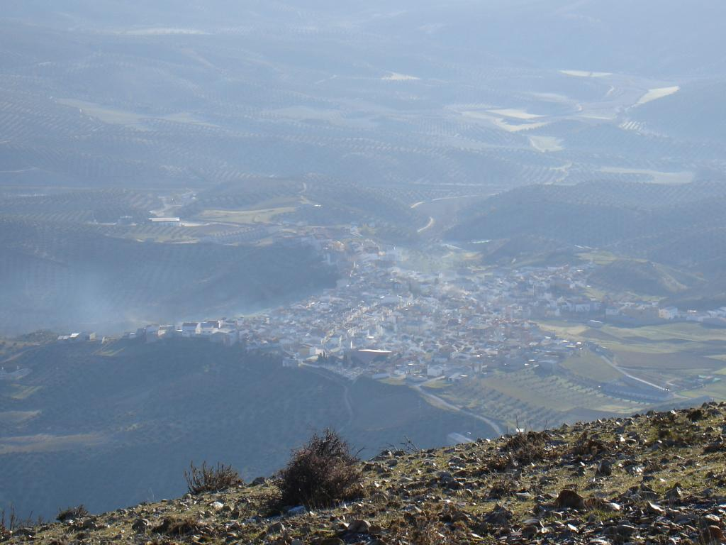 Noalejo